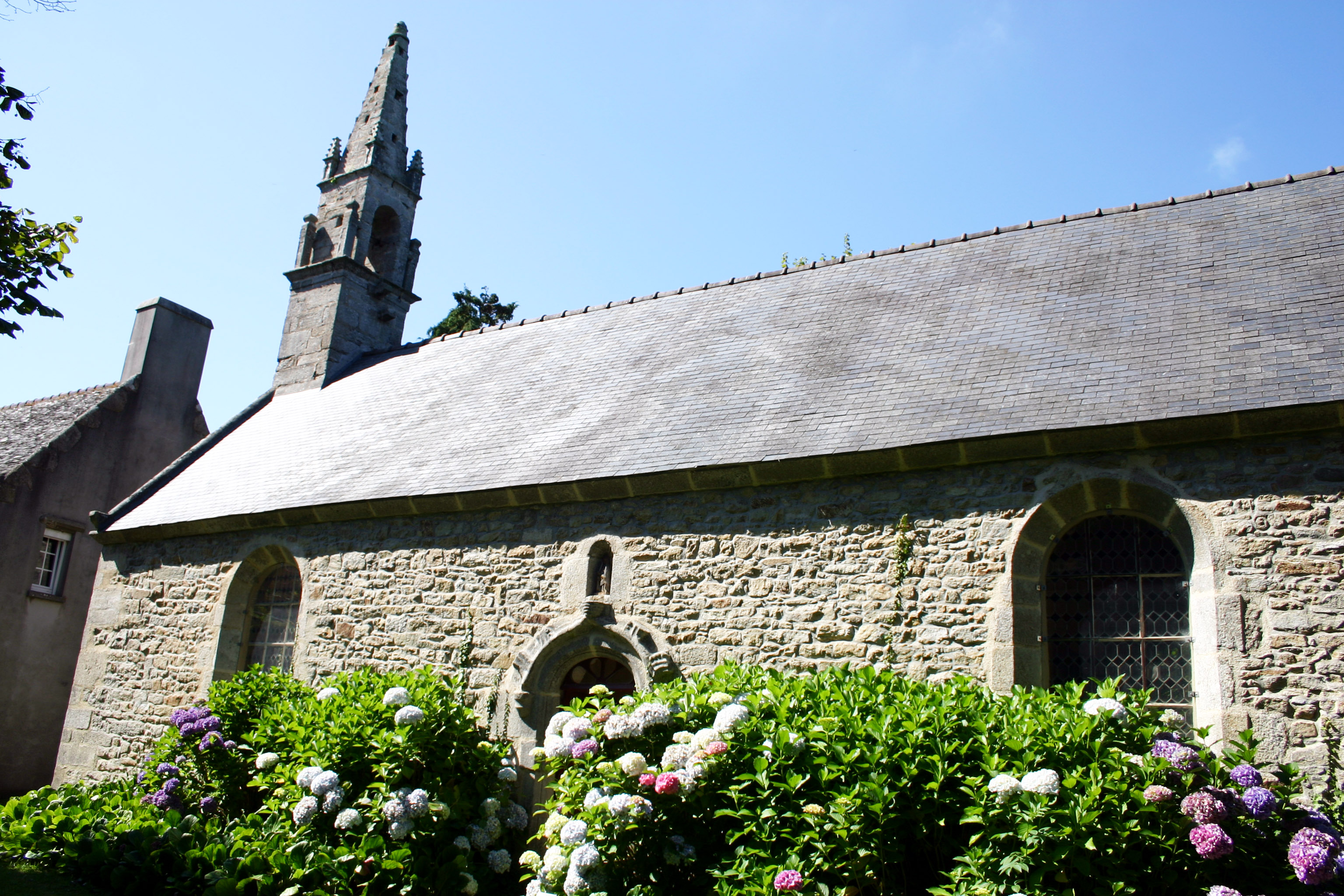 Chapelle Saint Claude Plouguerneau Finistère Bretagne France